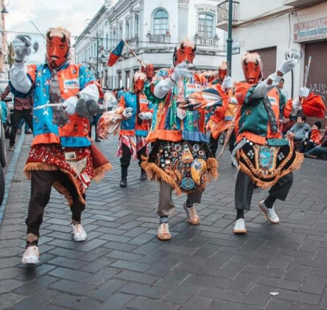 El diablo de hojalata un personaje histórico en la sociedad riobambeña, tradicional y con un gran significado en el pase del Niño, llena las plazas y calles de la ciudad de alegría a su paso.